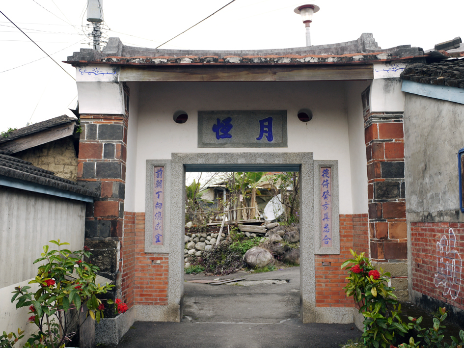 中文（台灣）: 東勢月恆門